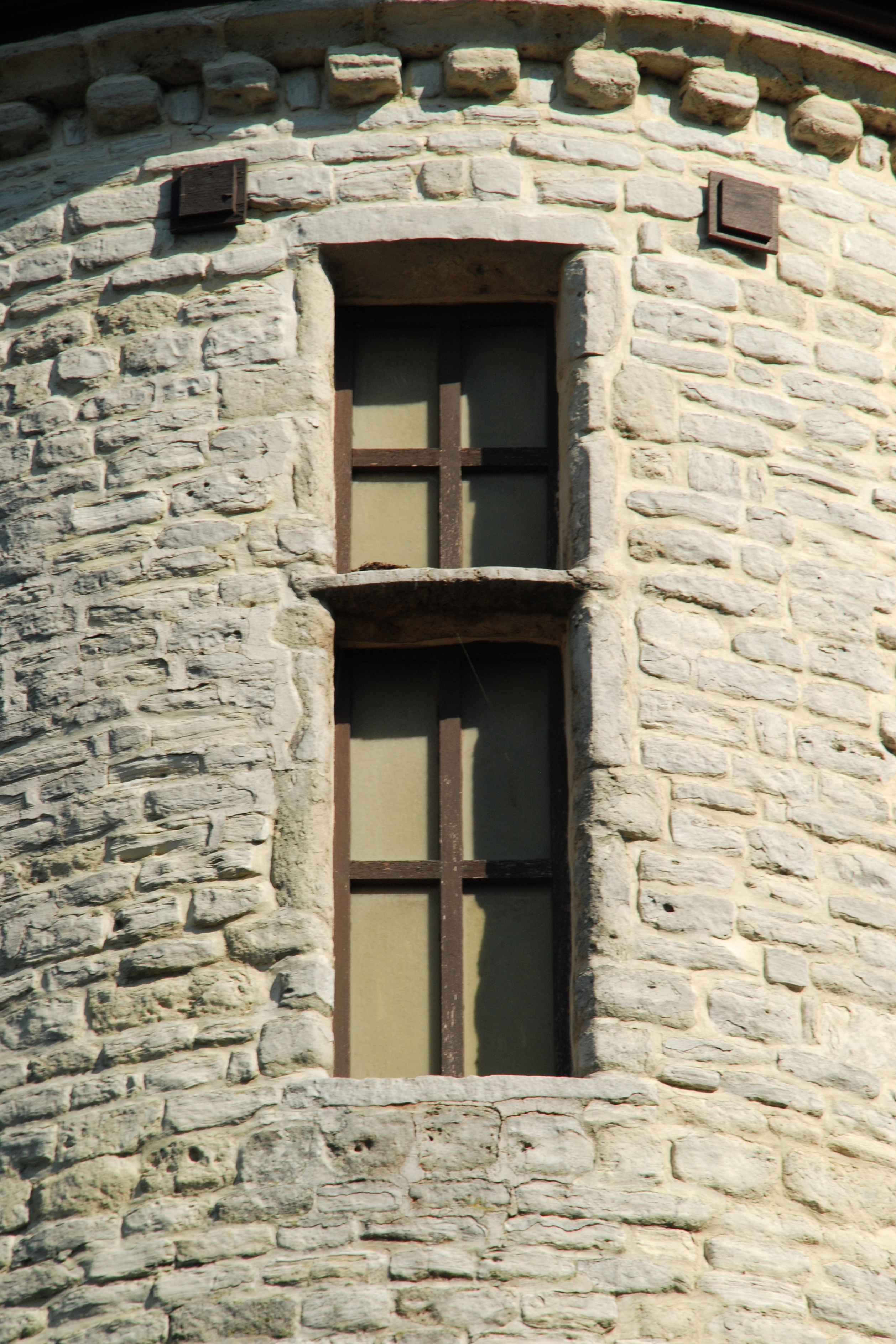 Belgique - Brabant flamand - Machelen - Diegem - Château Marga